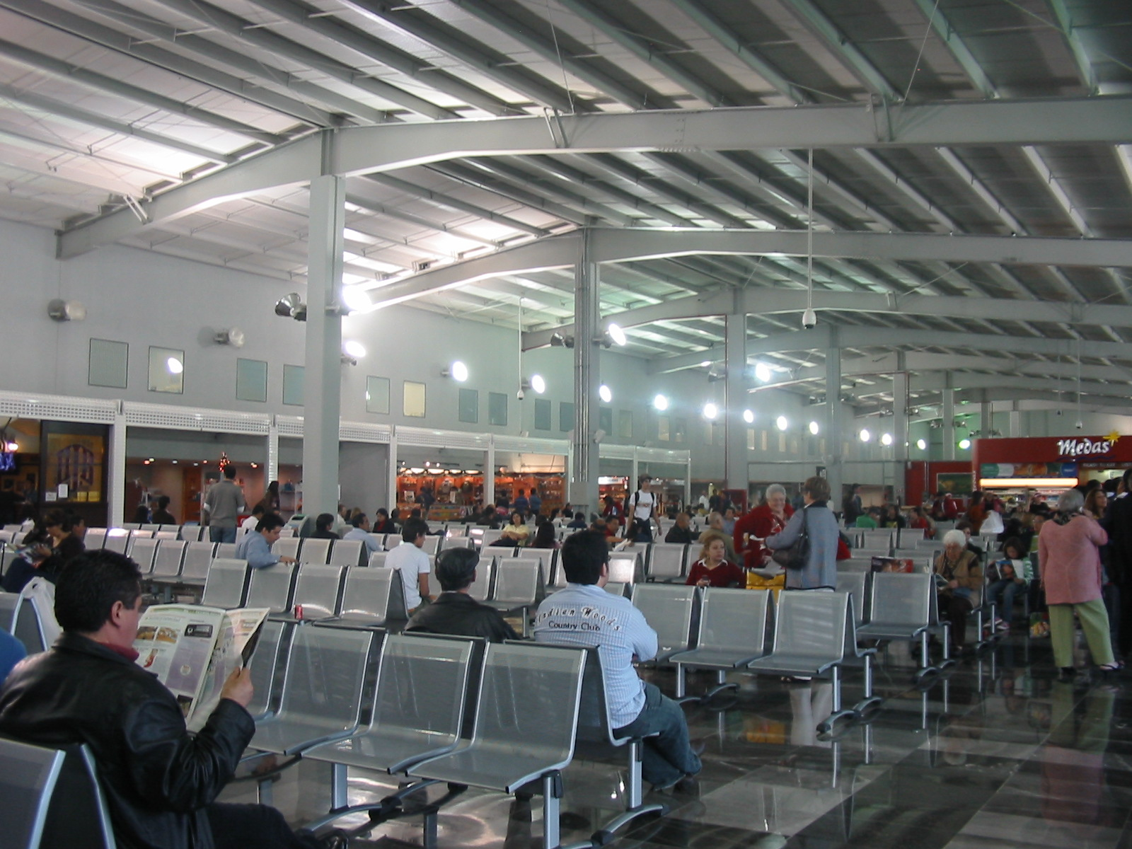 Departure terminal at Toluca airport